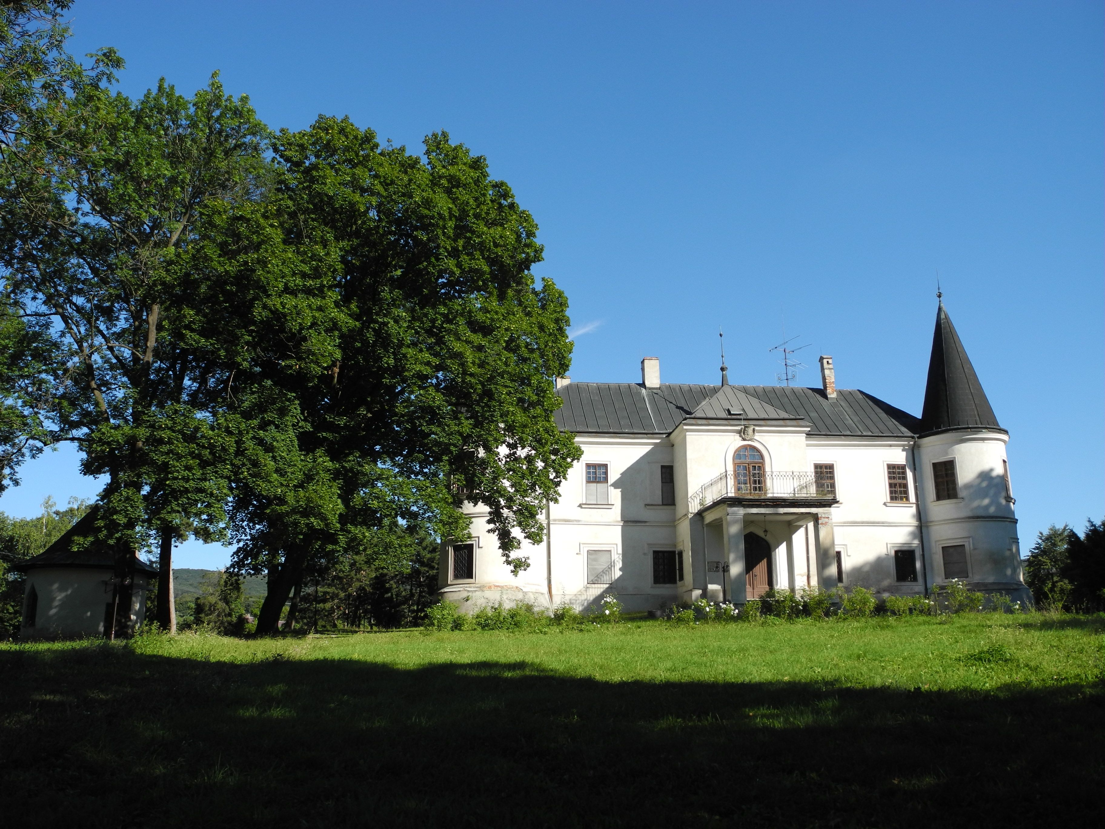 Kaštieľ